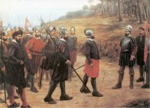 Ilustración de la fundación de la ciudad de Salta.